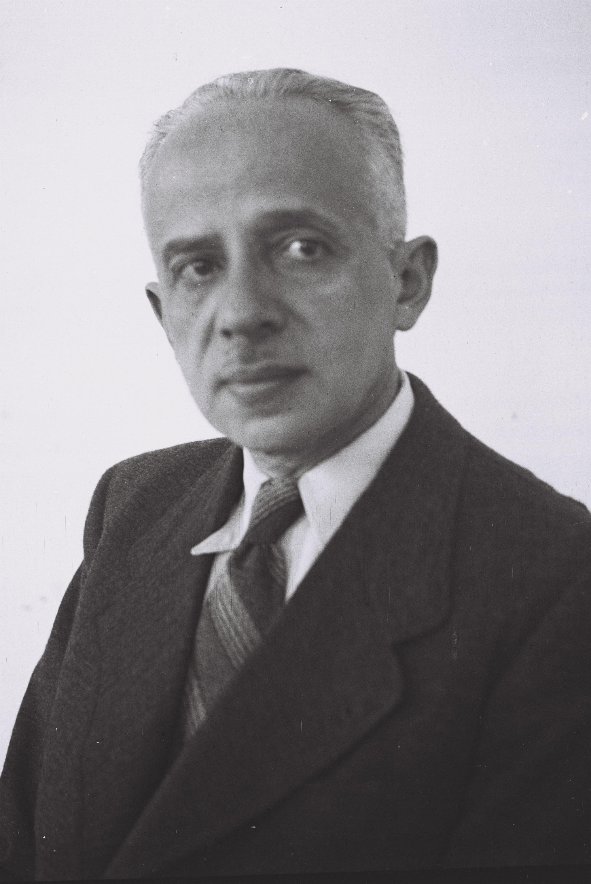 צילום דיוקן של המשורר משנת 1946 צולם על ידי זולטן קלוגר נמצא באוסף הלאומי של צילומים של ישראל